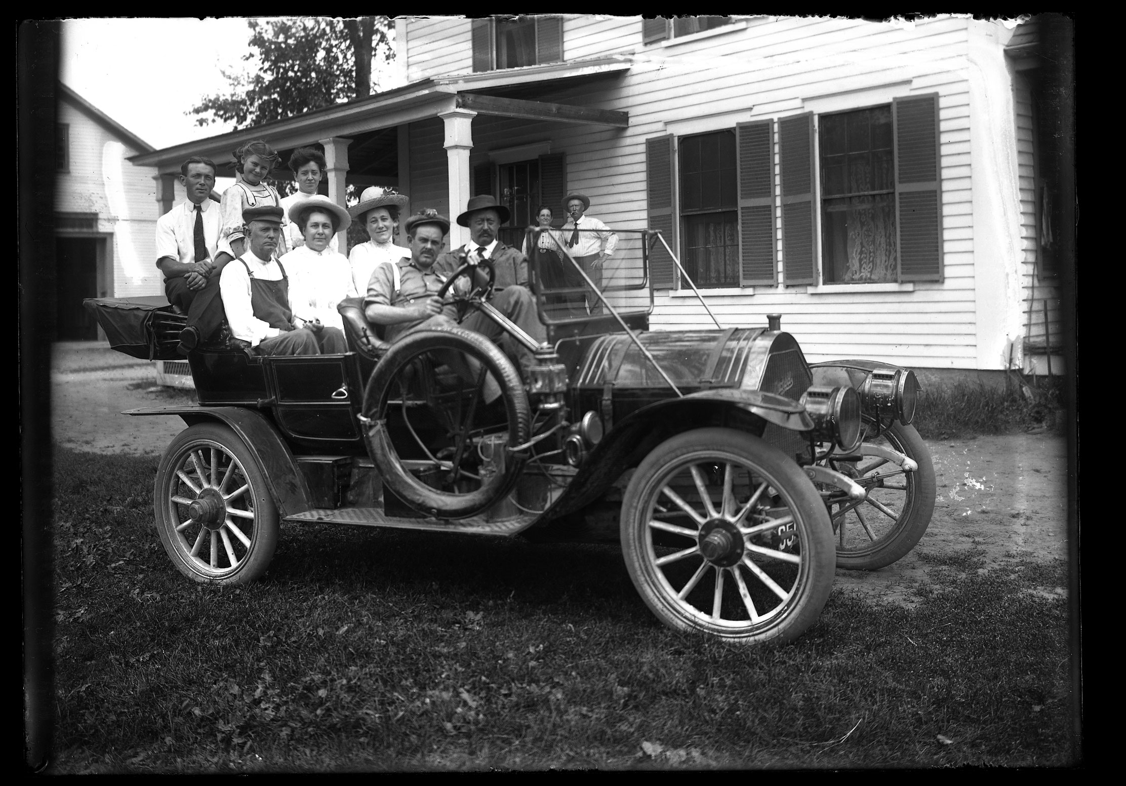 From original negative.